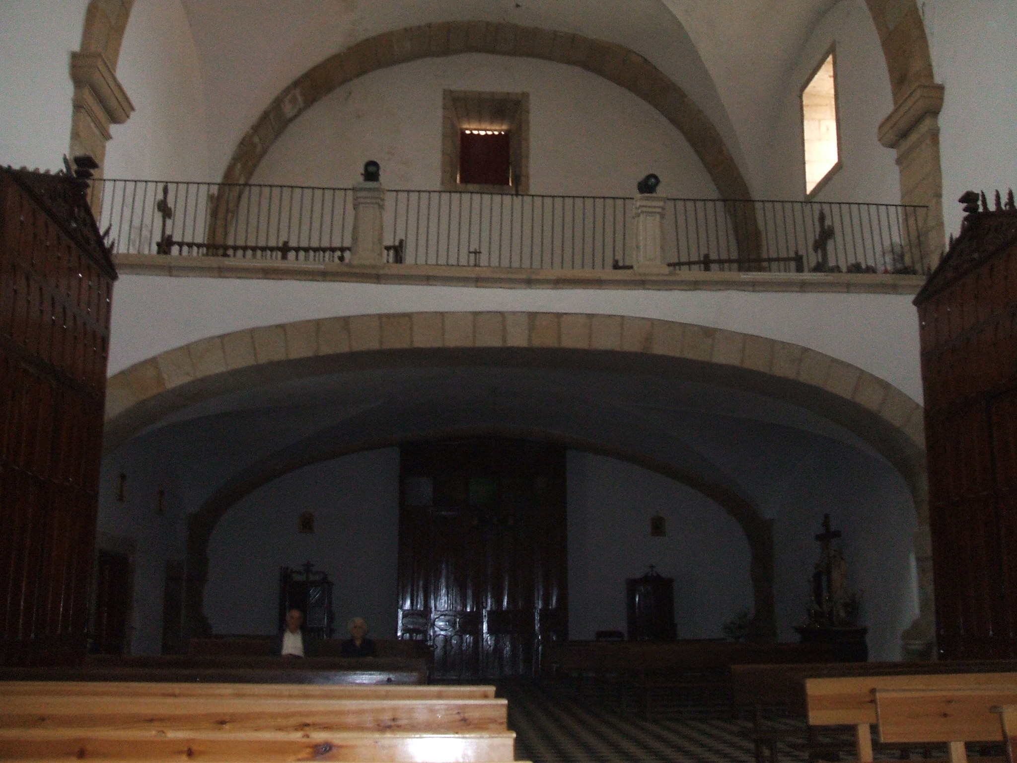 En la iglesia parroquial de Navas del Madroño (Cáceres) encontramos a los pies un coro alto sobre arco carpanel de atrevido trazado